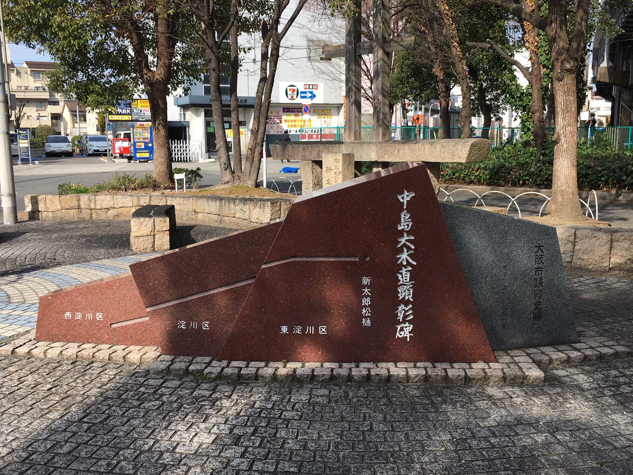 中島大水道記念碑